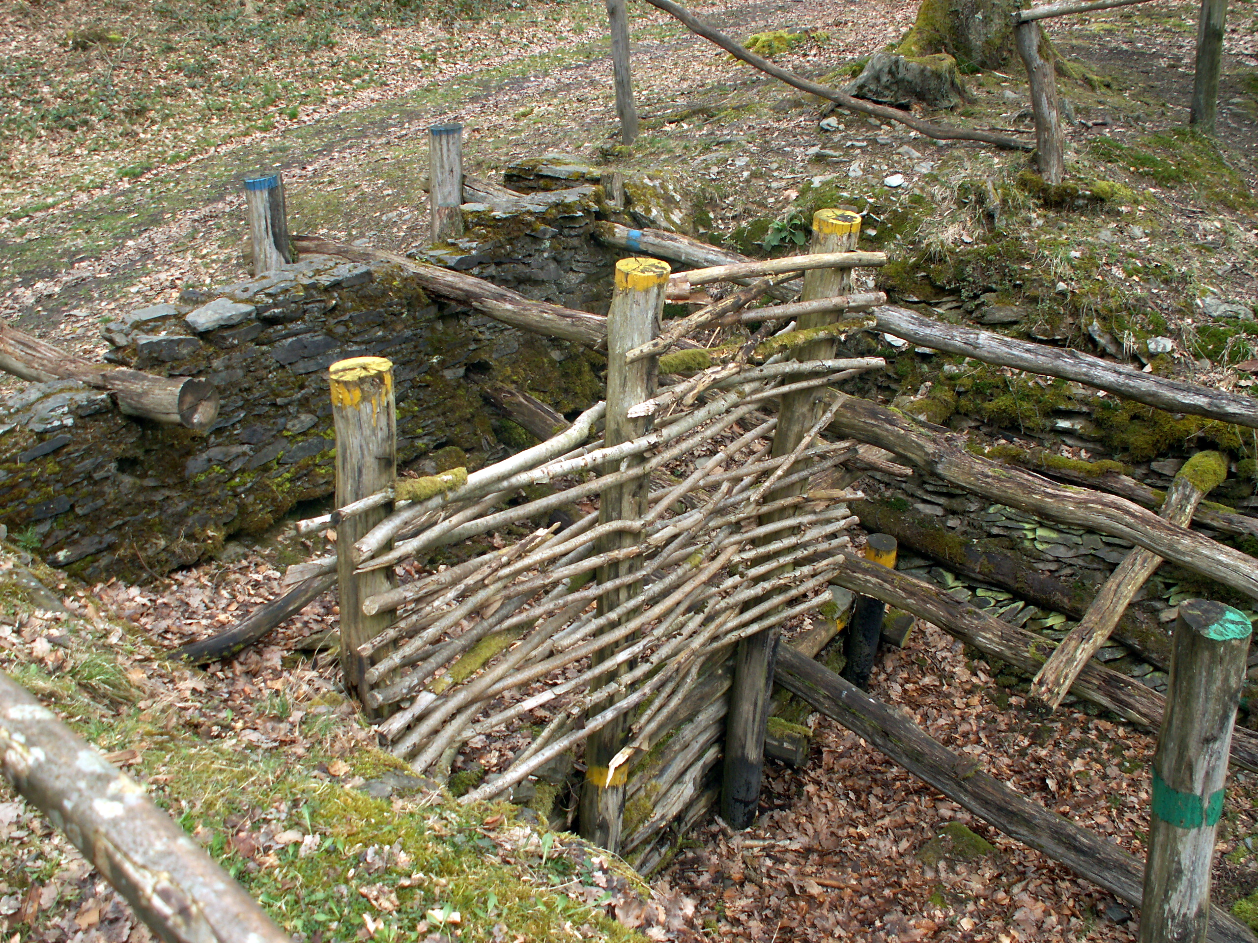 Le Cheslé de Bérisménil (Belgique) : reconstitution du premier mur d'enceinte de la forteresse celte.